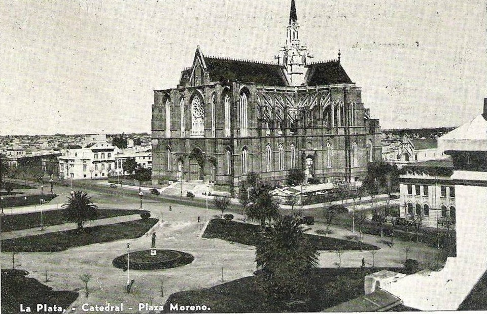 Tarjeta postal enviada en 1939, muestra la Catedral de La Plata y la Plaza Moreno. El edificio quedó inconcluso y sin sus torres hasta el año 1999.